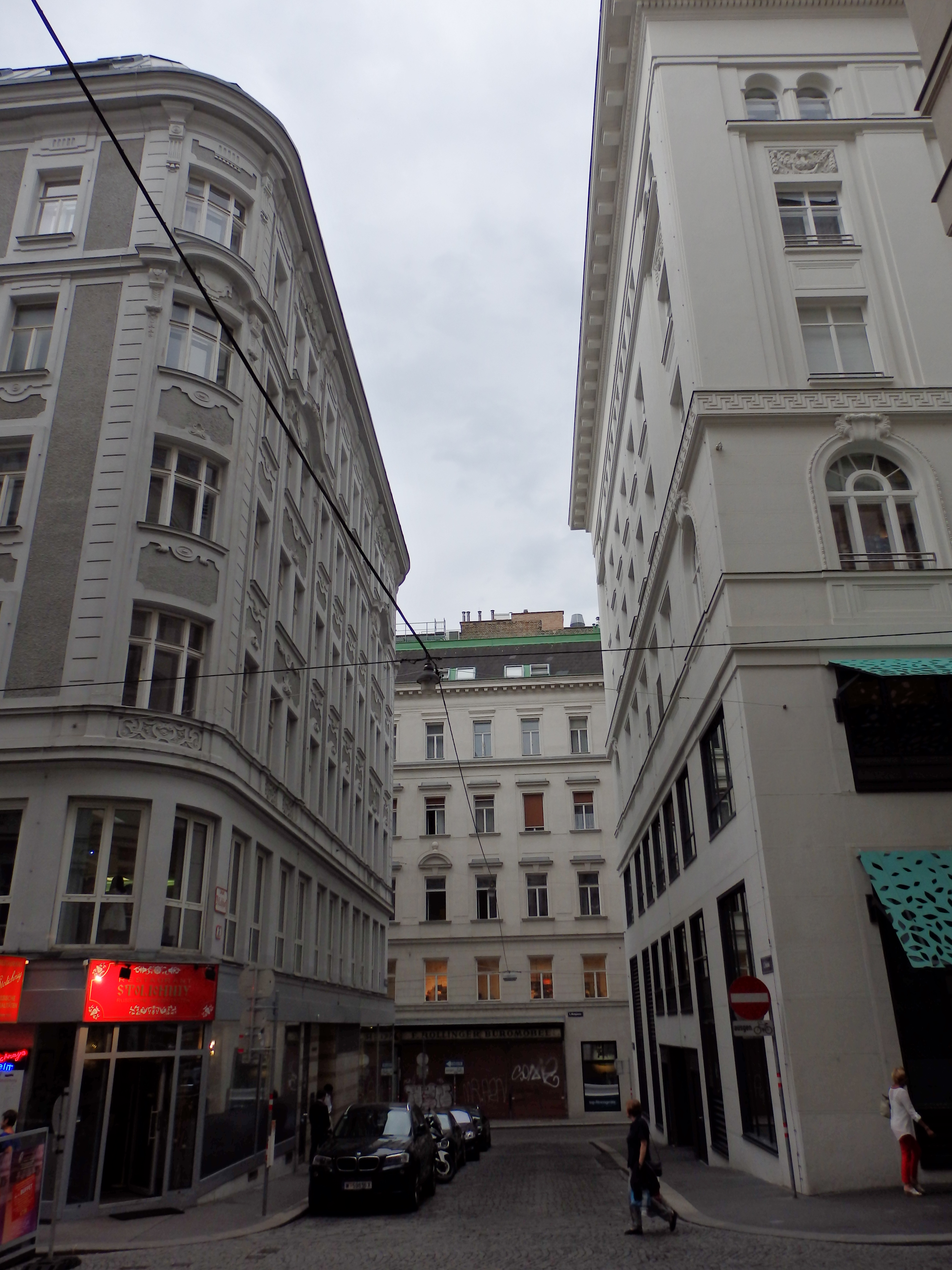 Fischhof vom Bauernmarkt aus gesehen, Wien-Innere Stadt